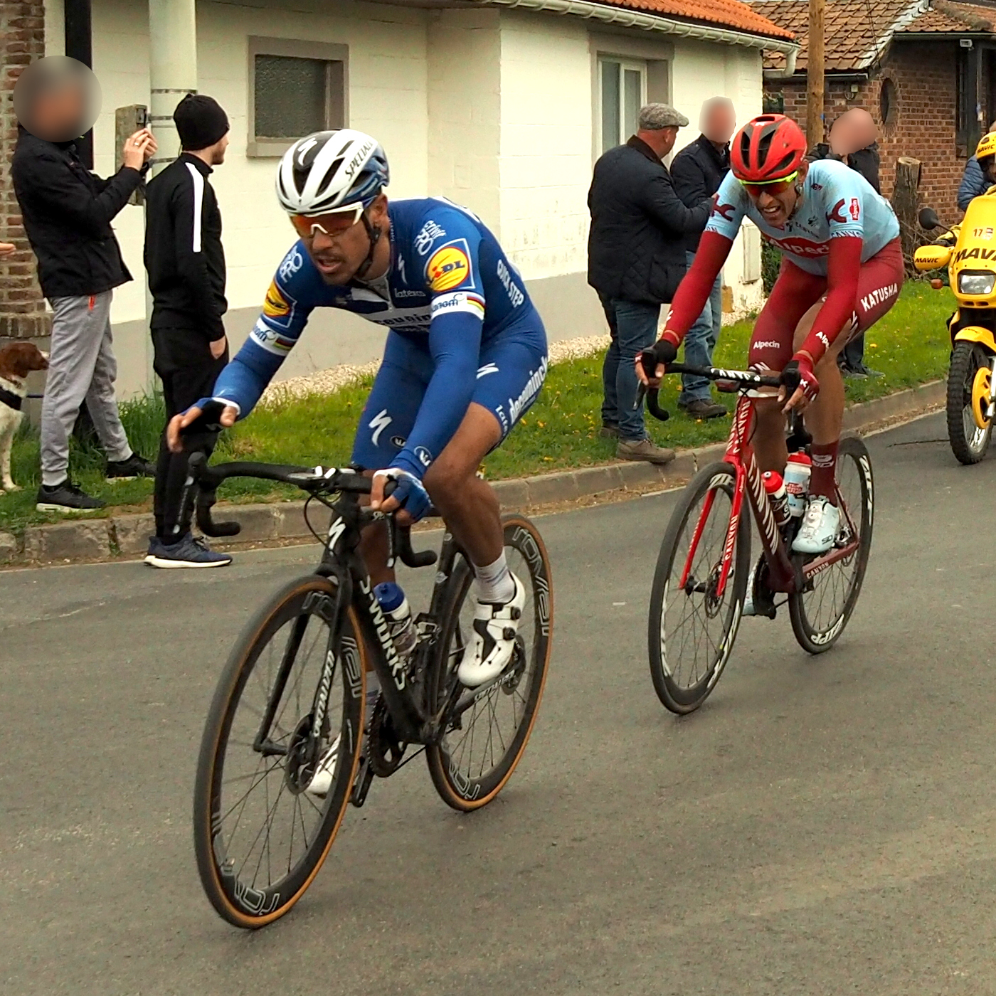 Philippe Gilbert (à gauche) et Nils Politt (à droite), en tête à 8 kilomètres de l'arrivée du Paris-Roubaix 2019, le 14 avril 2019